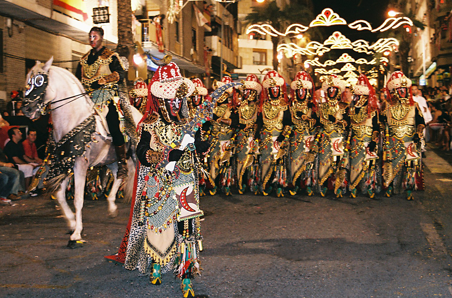 escuadra de negros - Capitanía Kábilas 2005 - Ontinyent (Valencia)